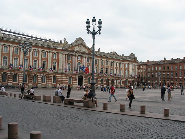 Toulouse (Haute-Garonne, France) - Le Capitole et la place du Capitole.